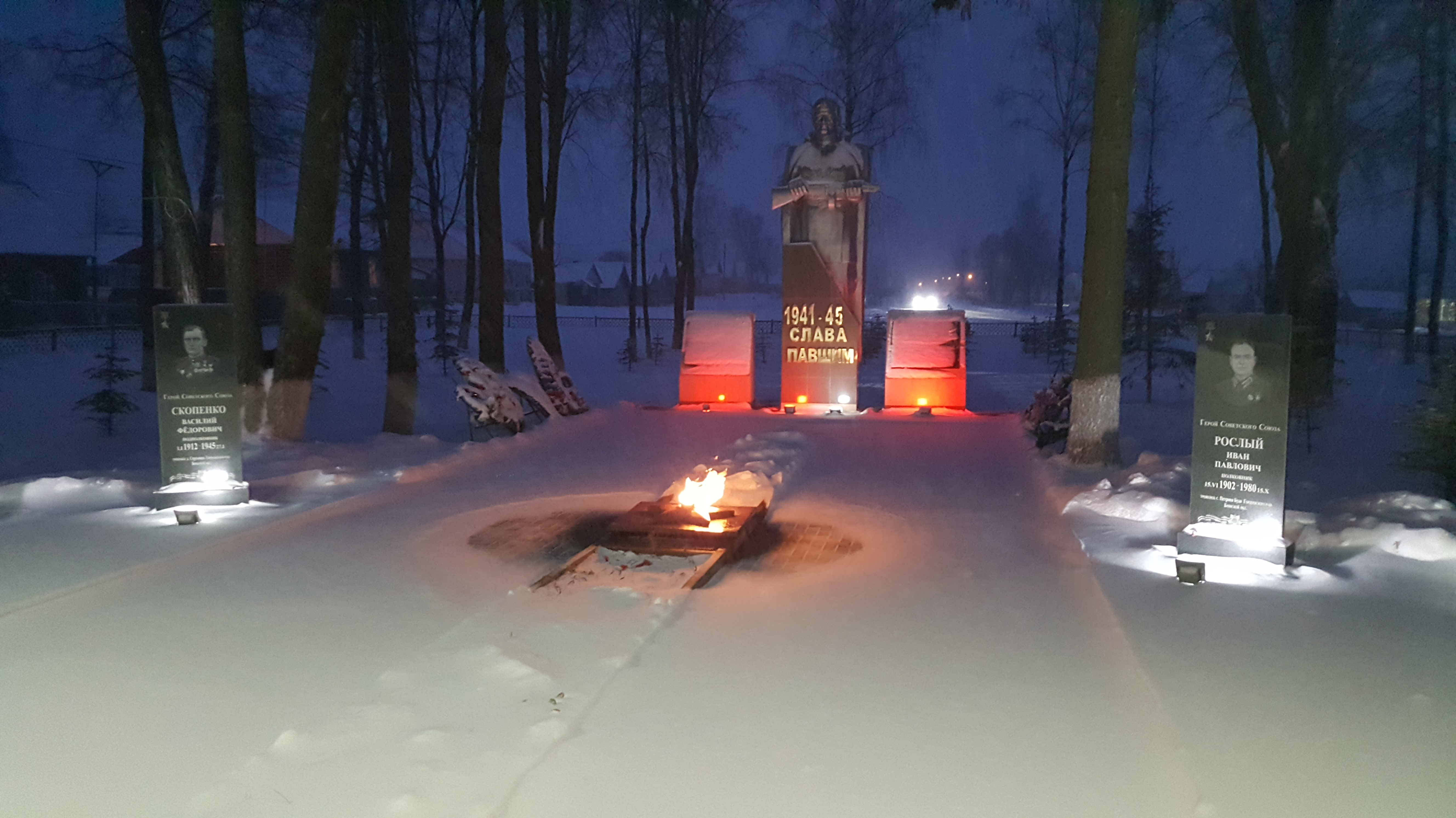 Мемориал Неизвестному солдату и аллея павших